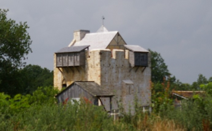 Donjon de Clairbois, DoMaine du chavalier